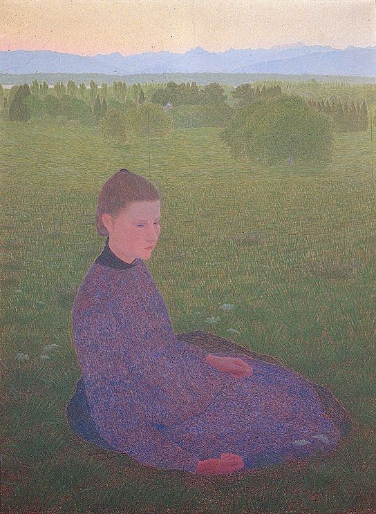 L'aube